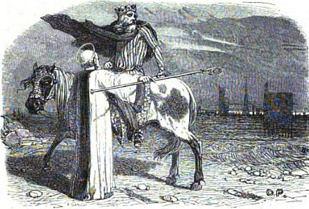 Gravure de la légende Keris dans le recueil d'Emile Souvestre, Le foyer breton, 1844.